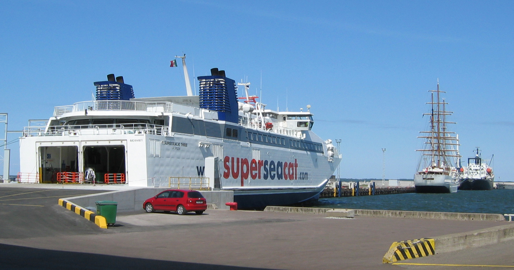 Tallinn, Stadtzentrum